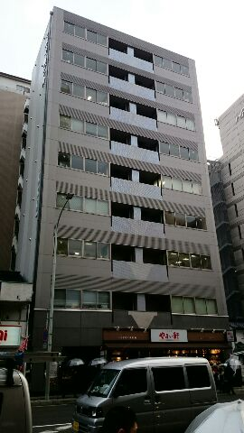 京都府京都市下京区四条通西洞院東入新釜座町716-1 平野ビル